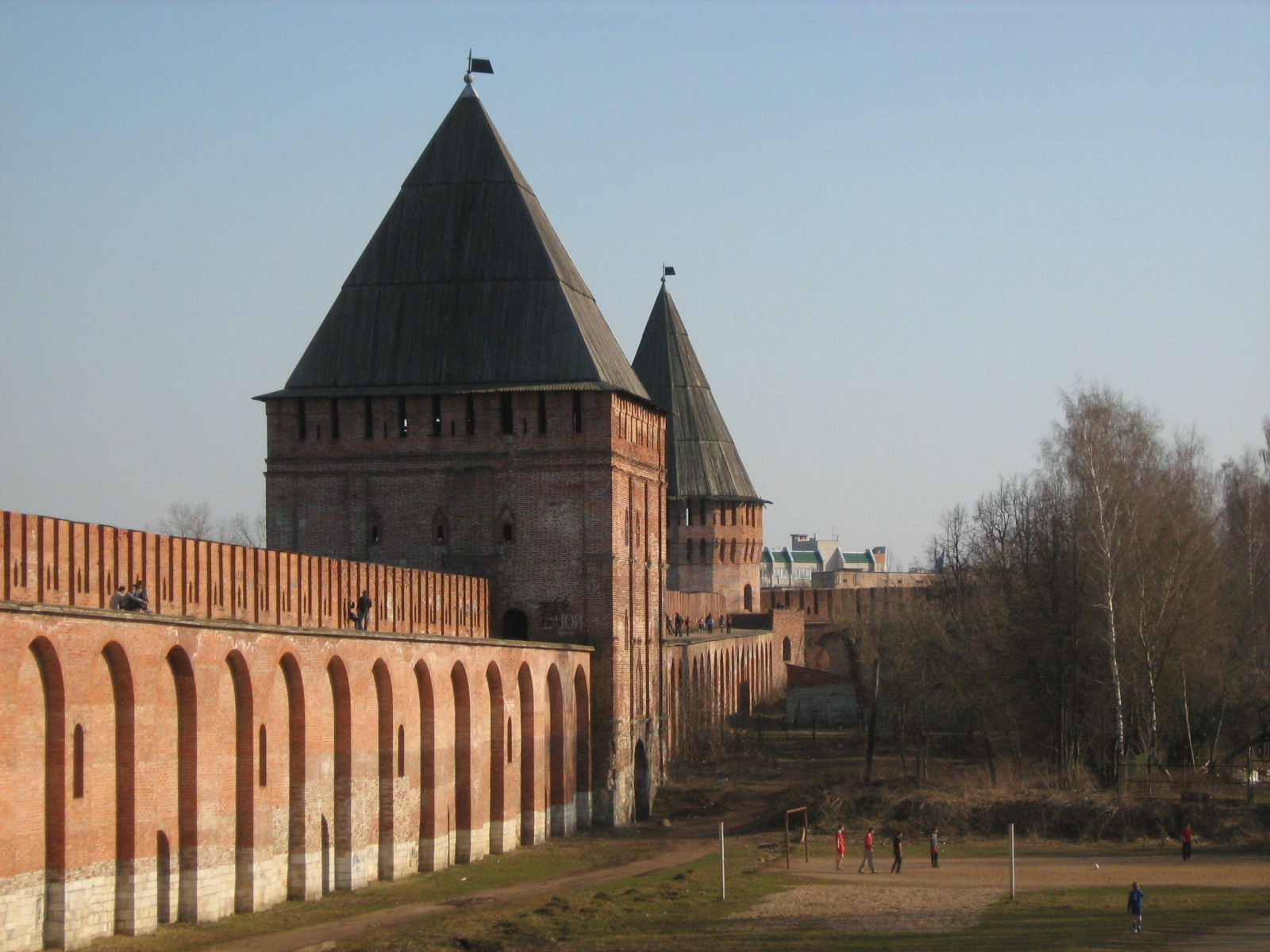 Один из прекраснейших исторических, военных объектов.